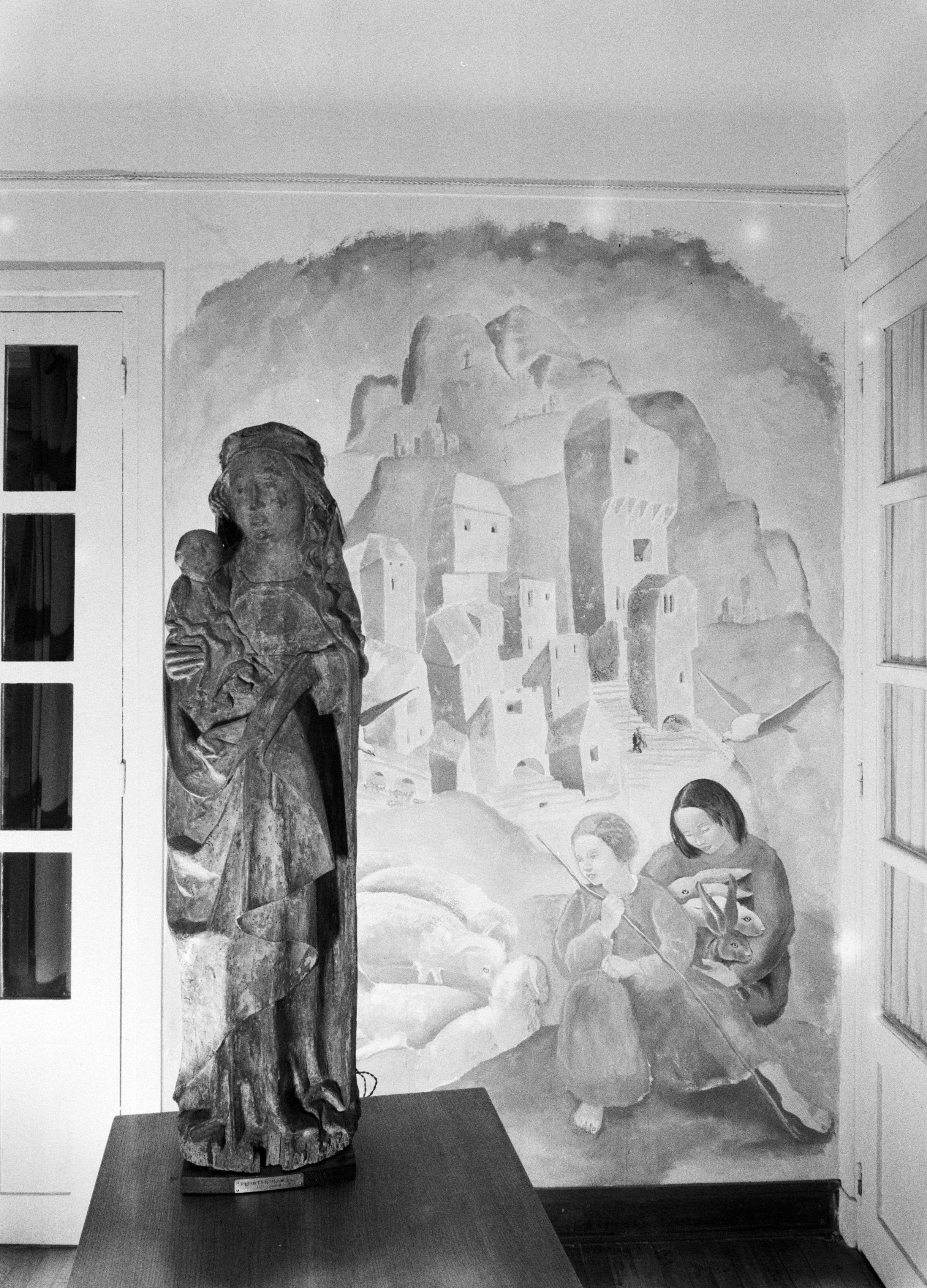 Collectie / Archief : Fotocollectie Van de Poll Reportage / Serie : Reportage Mariette Lydis Beschrijving : Interieur van de woning van de kunstenaresse Mariette Lydis (1887-1970), 55 Rue Boileau, Parijs. Op de achtergrond een muurschildering. Datum : oktober 1936 Locatie : Frankrijk, Parijs Trefwoorden : interieurs, muurschilderingen Persoonsnaam : Lydis, Mariette Fotograaf : Poll, Willem van de Auteursrechthebbende : Nationaal Archief Materiaalsoort : Glasnegatief Nummer archiefinventaris : bekijk toegang 2.24.14.02 Bestanddeelnummer : 191-0558